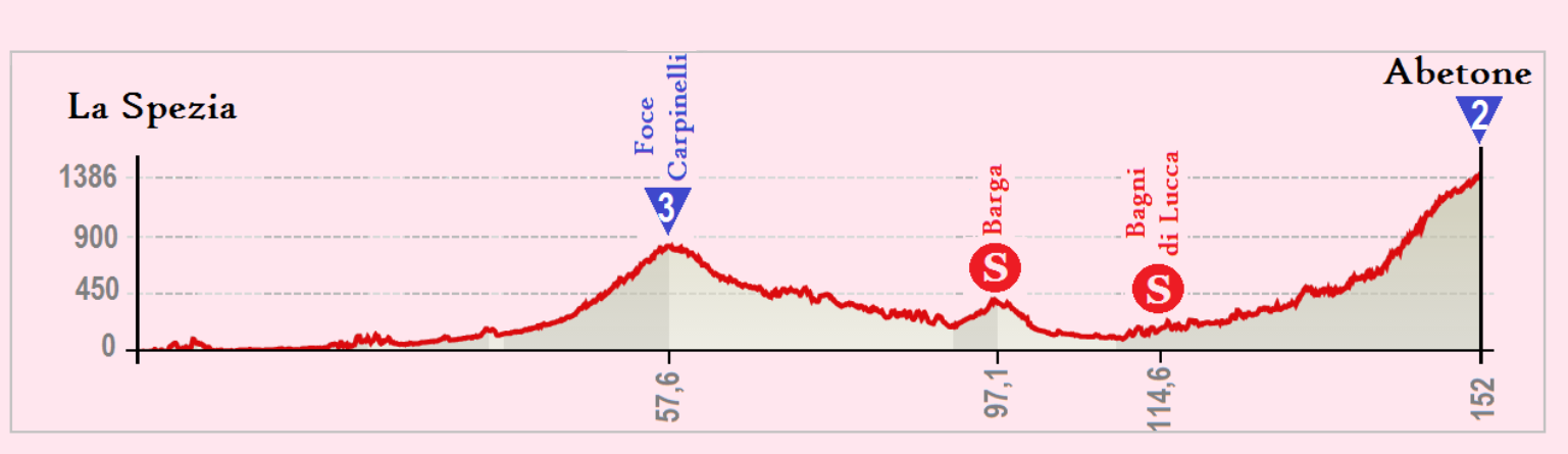 Perfil de la 5.ª etapa del Giro de Italia 2015